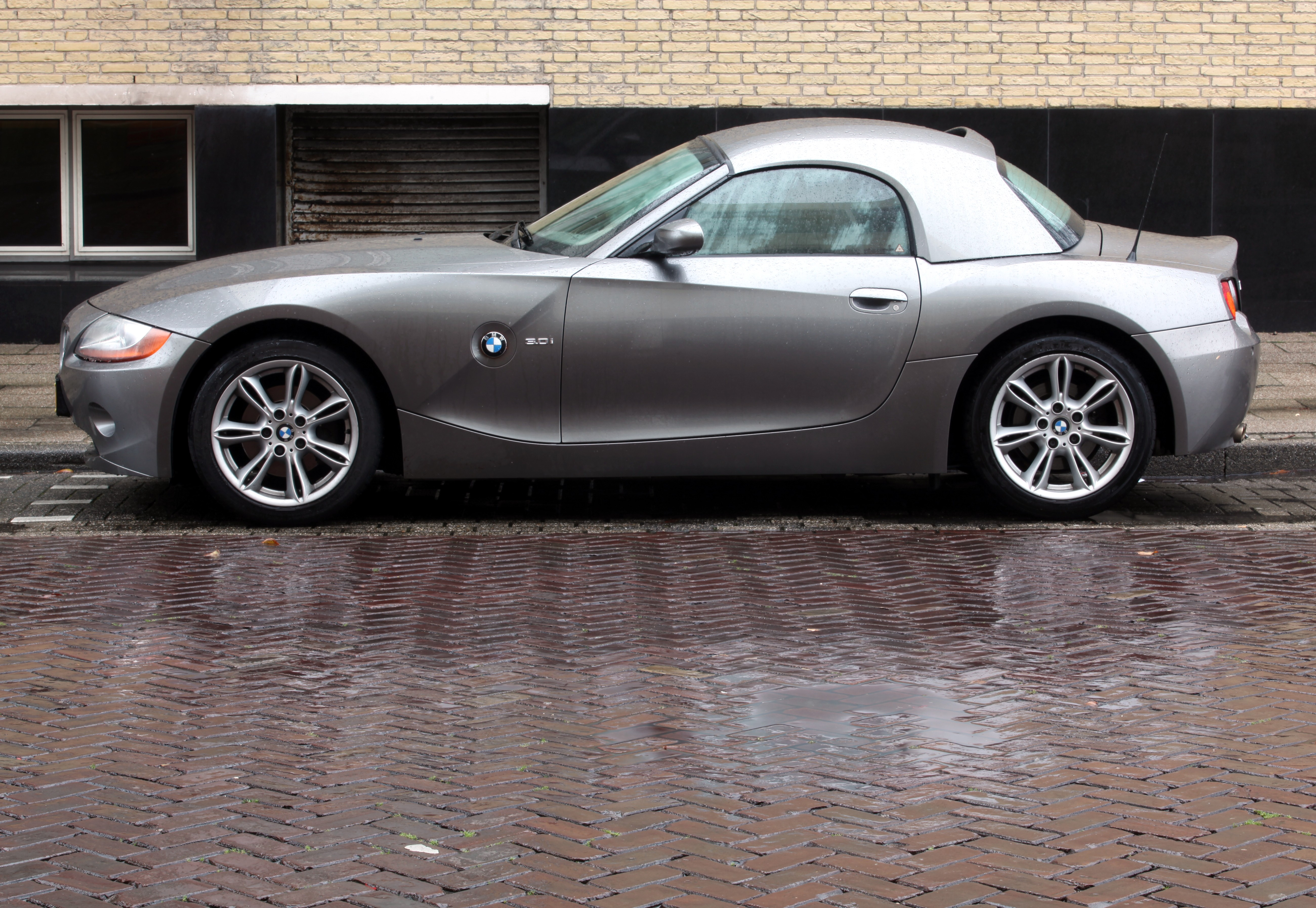 BMW Z 4 roadster 3.0 I